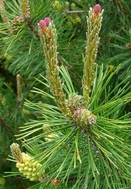 Zweigspitze der Bergkiefer Pinus mugo (Nacktsamer). Links unten eine männliche Blüte mit Pollensäcken (gelb), obenT weibliche Blüten (pink), in der Mitte ein aus einer weiblichen Blüte entstandener Zapfen.